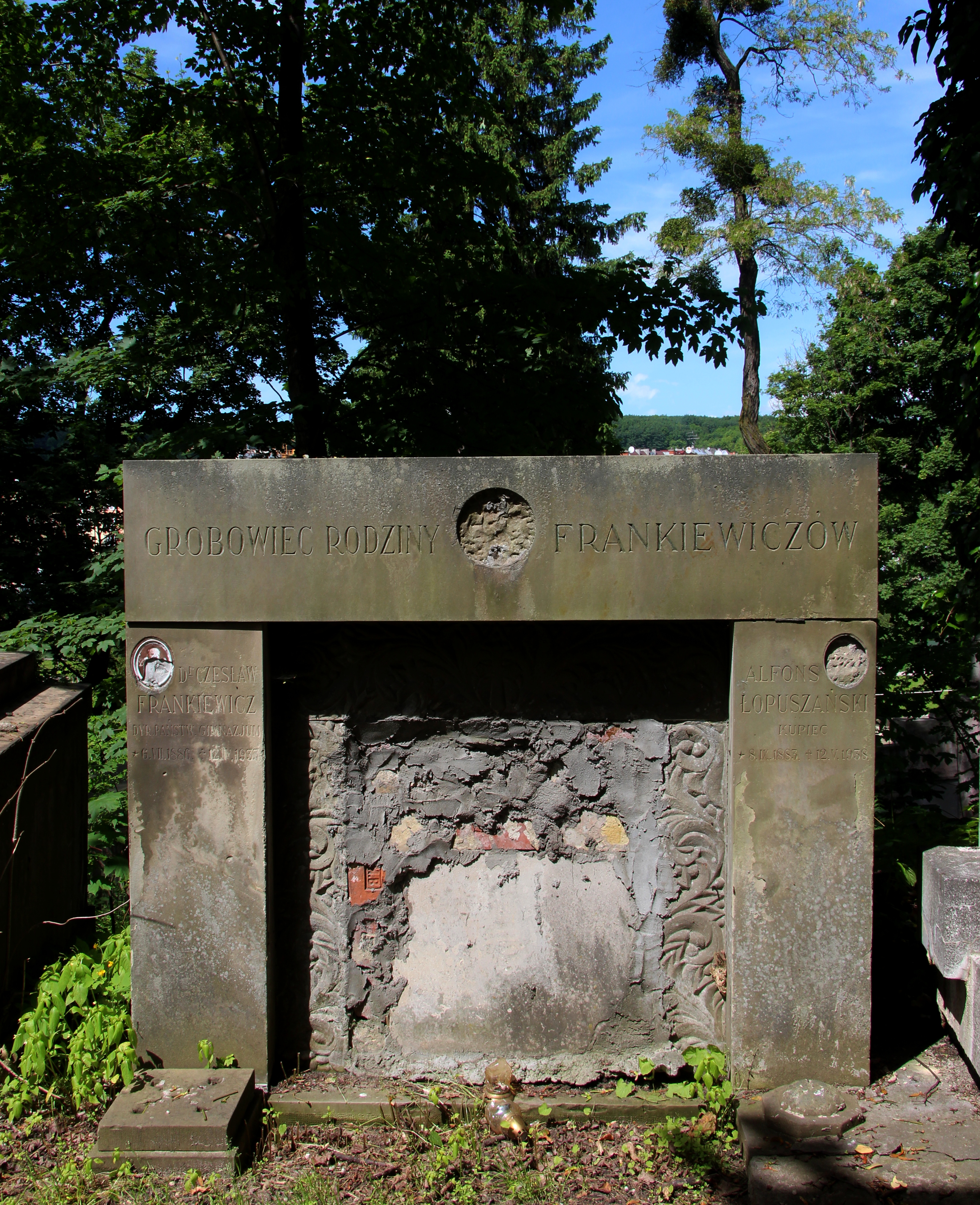 Гробівець родини Франкевичів. Личаківський цвинтар ,поле №62.